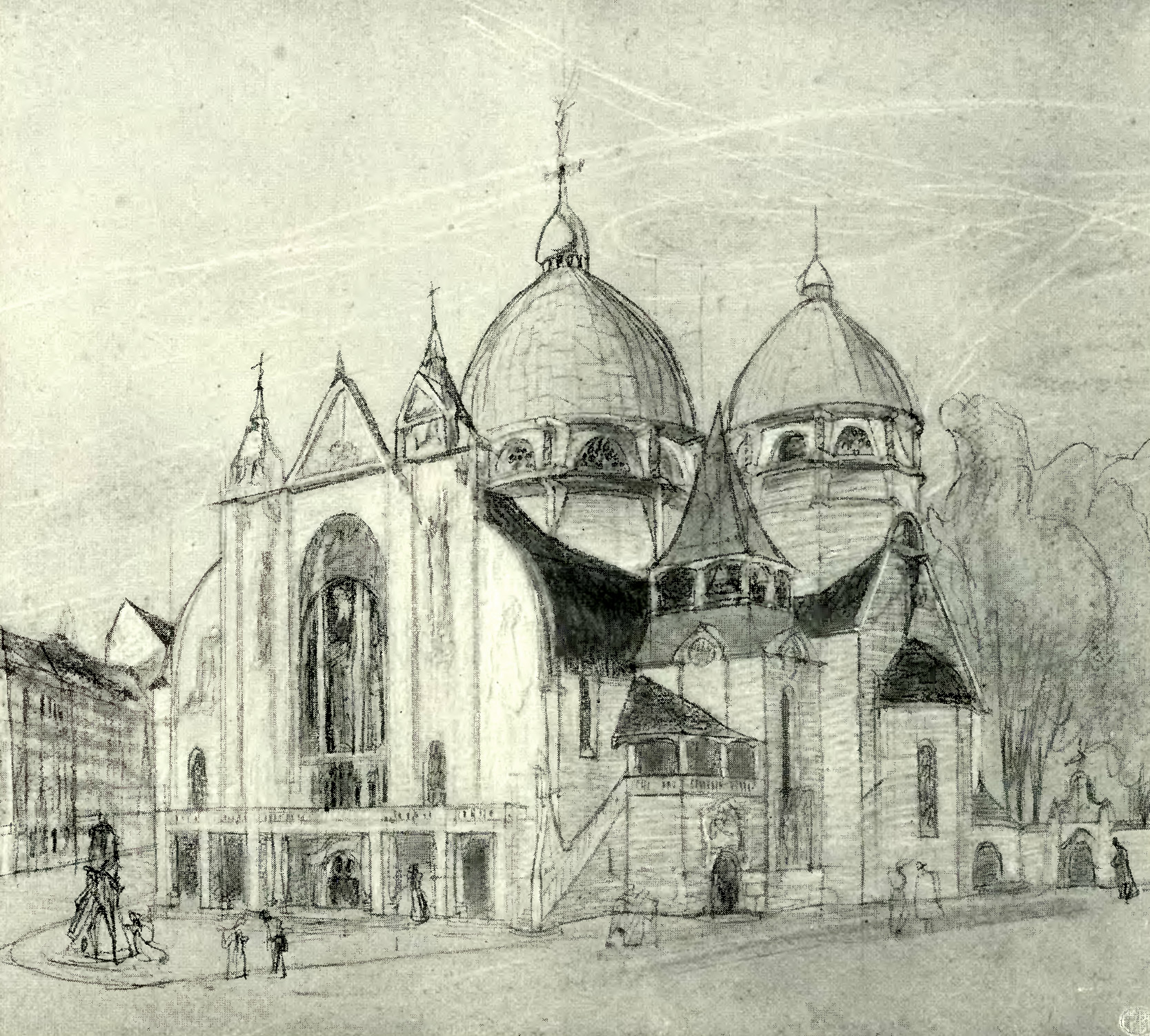 Конкурсний проект нового костелу святої Анни. 1912 рік. Архітектор Веслав Ґжимальський (1891—1941).